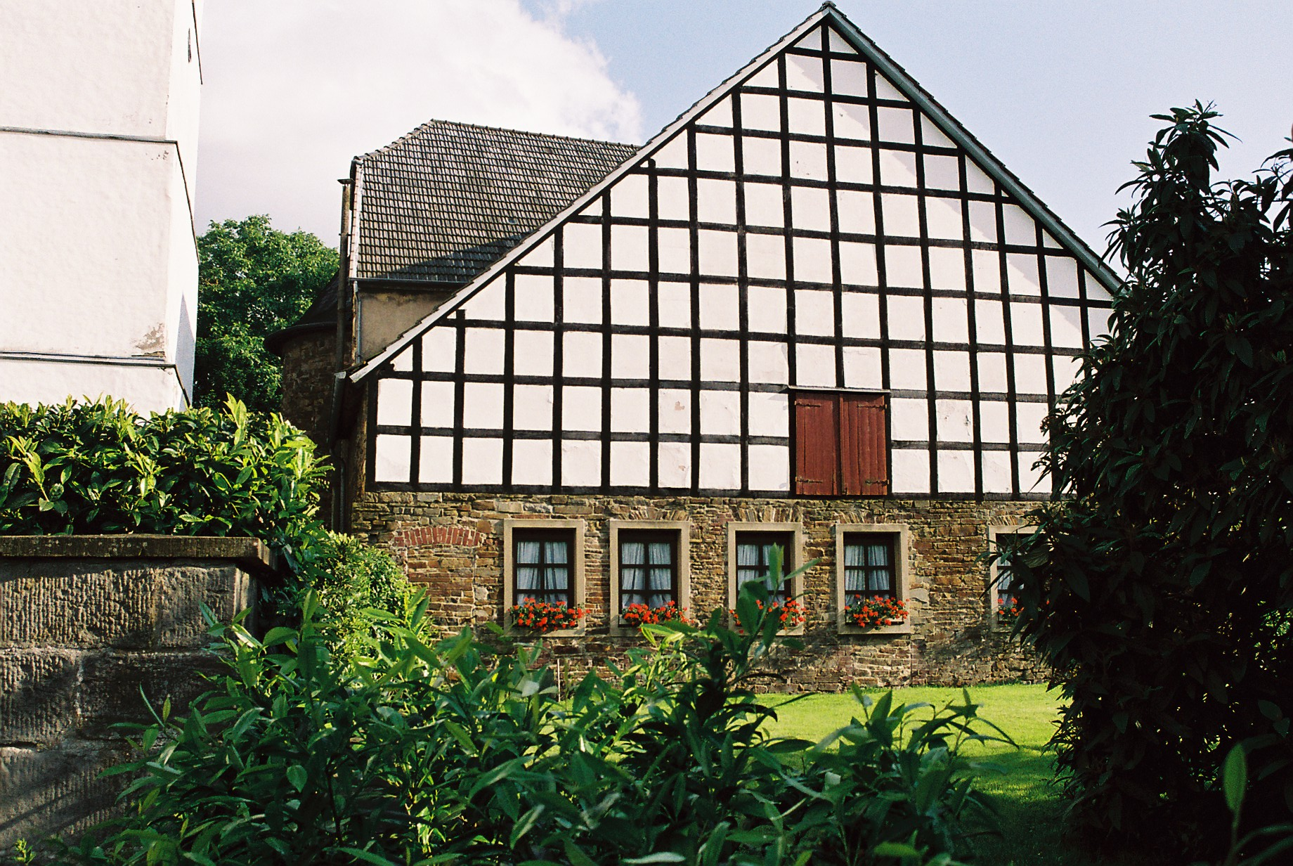 Burg Honrath in Lohmar, Nordseite mit Fachwerkgiebel